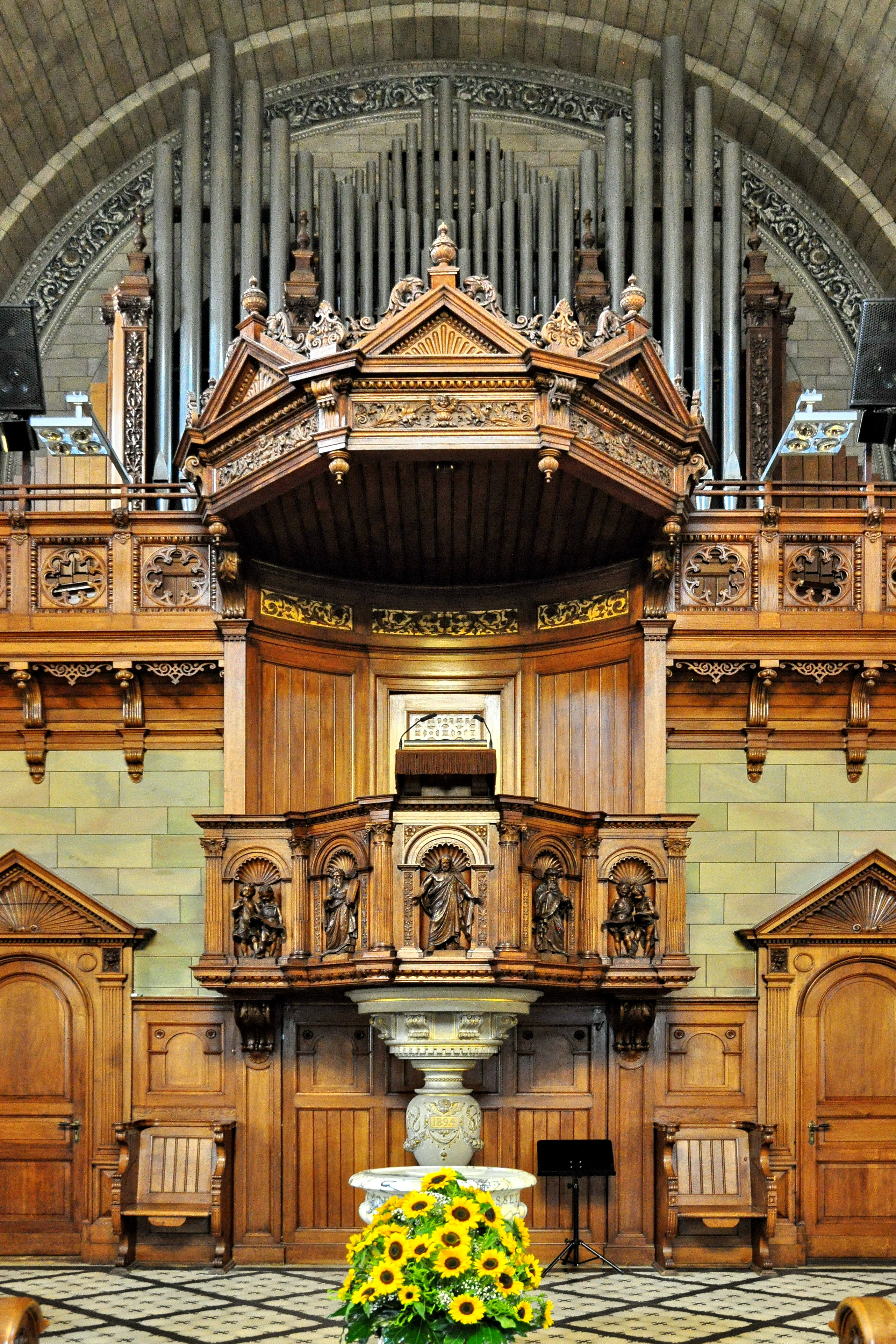 Kirche Enge in Zürich-Enge (Switzerland)